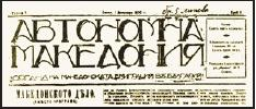 Главата на вестник Автономна Македония, брой 1.